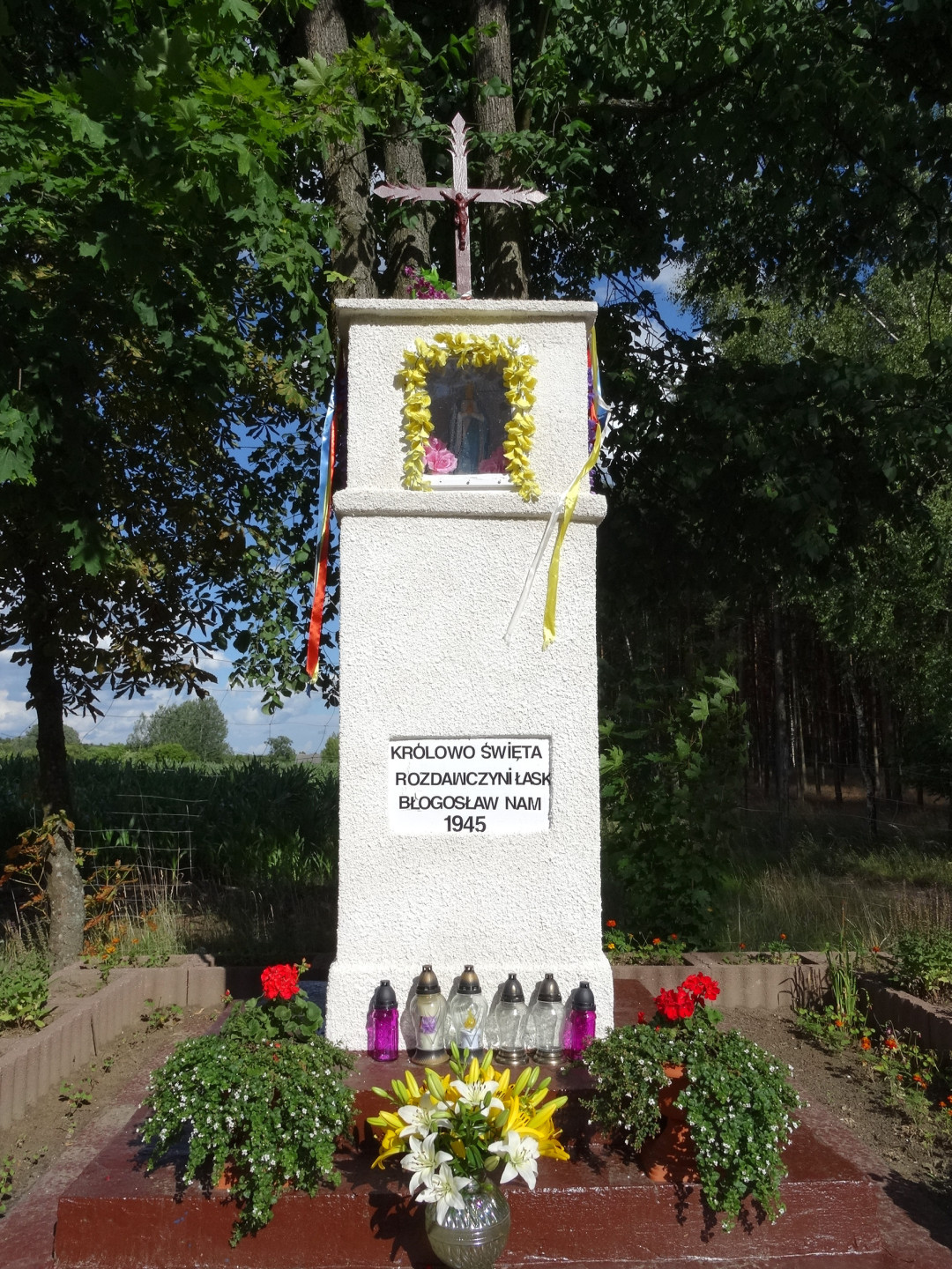 Chrośna, gmina Solec Kujawski, przydrożna kapliczka